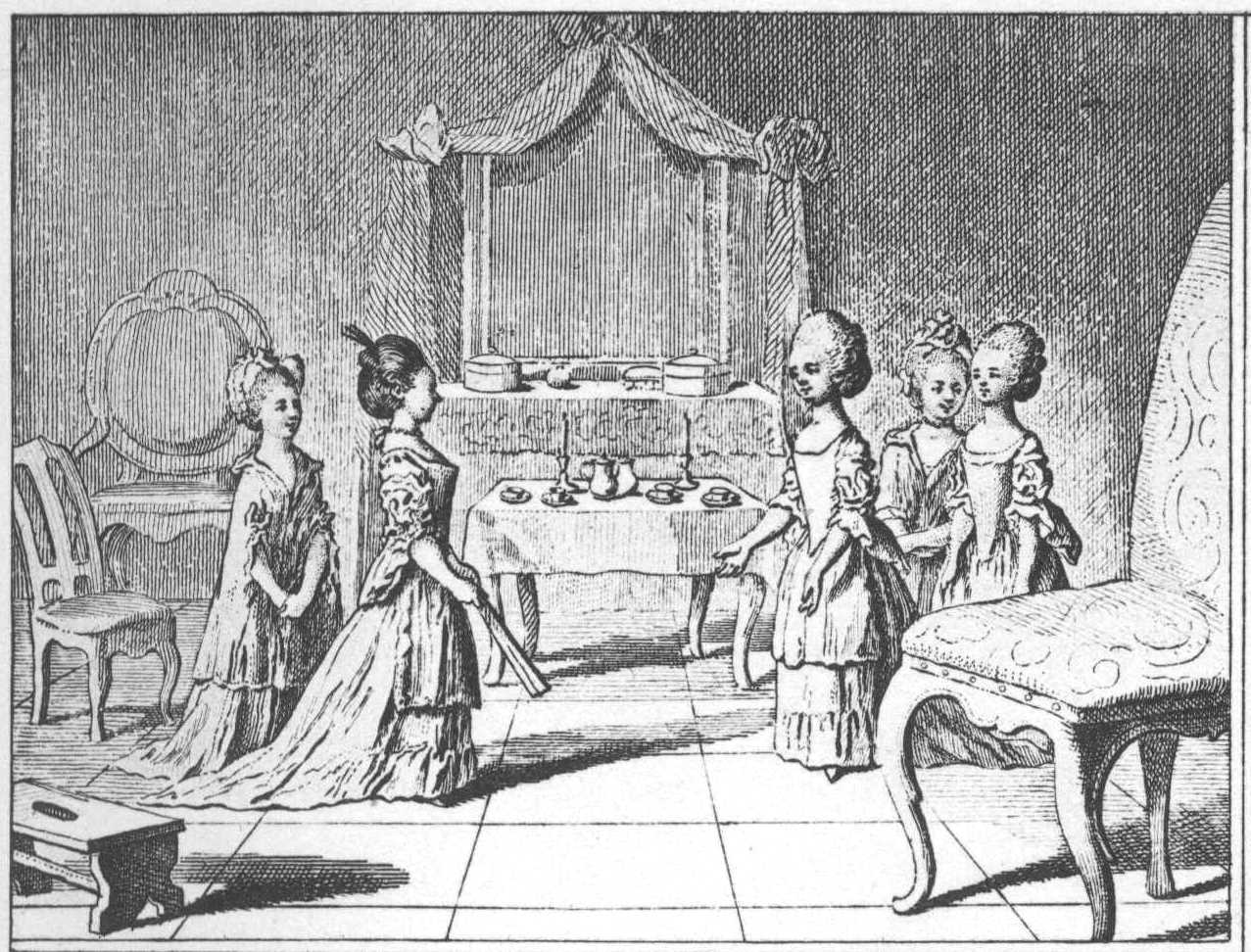 Andere Vergnügungen der Kinder. a) Das Besuchspiel. (Beschreibung lt. Quelle)